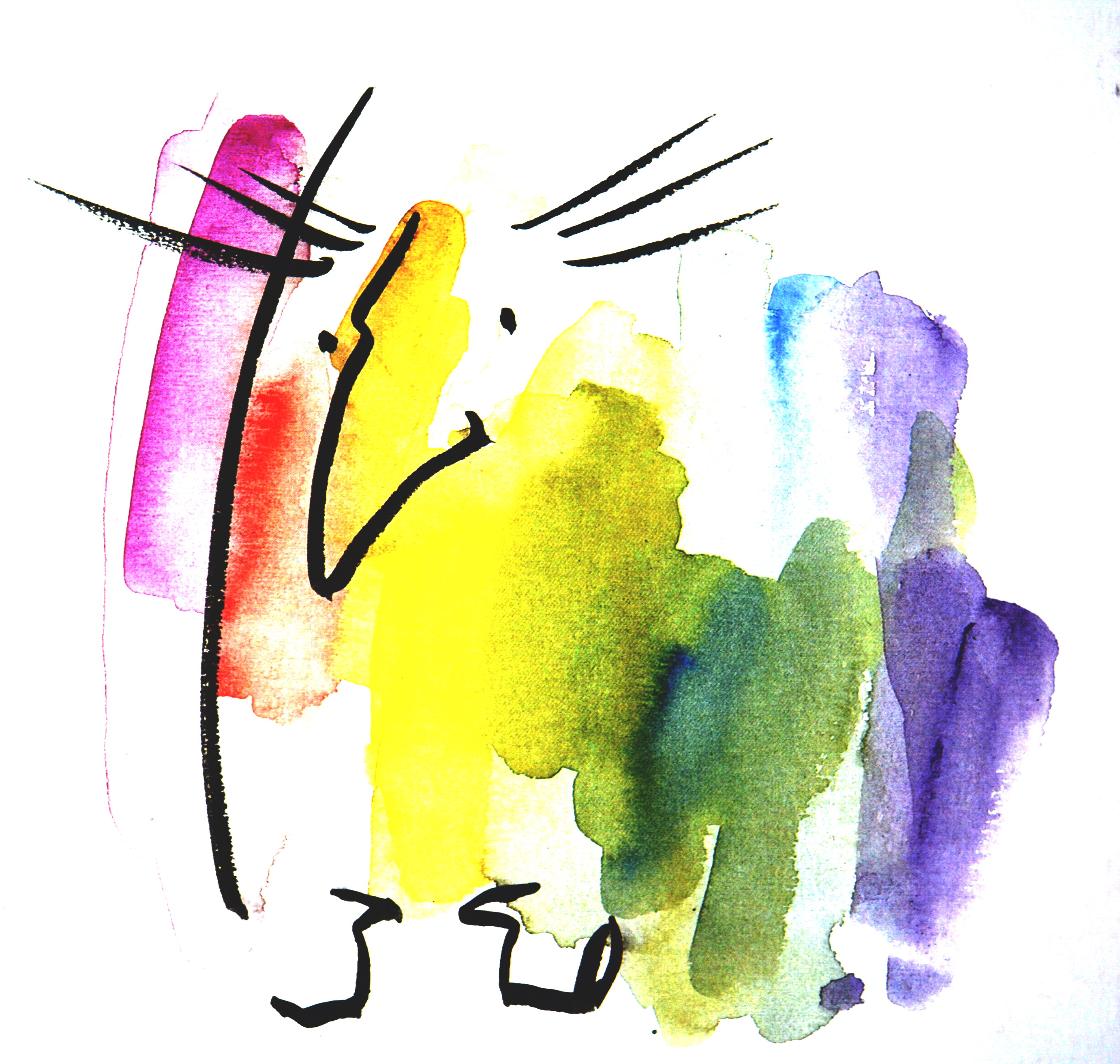 Hartmut Urban, Hemler der Vogel, 1992 Dieses Bild ist als Titelbild veröffentlicht am Einband des Buches Hemler der Vogel von Alfred Kolleritsch mit Zeichnungen von Hartmut Urban, Literaturverlag Droschl, Graz 1992; Kopie des Bildes Hartmut Urbans in Privatbesitz